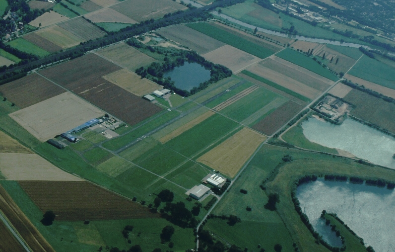 Luftaufnahme Flugplatz Porta Westfalica bearbeitet